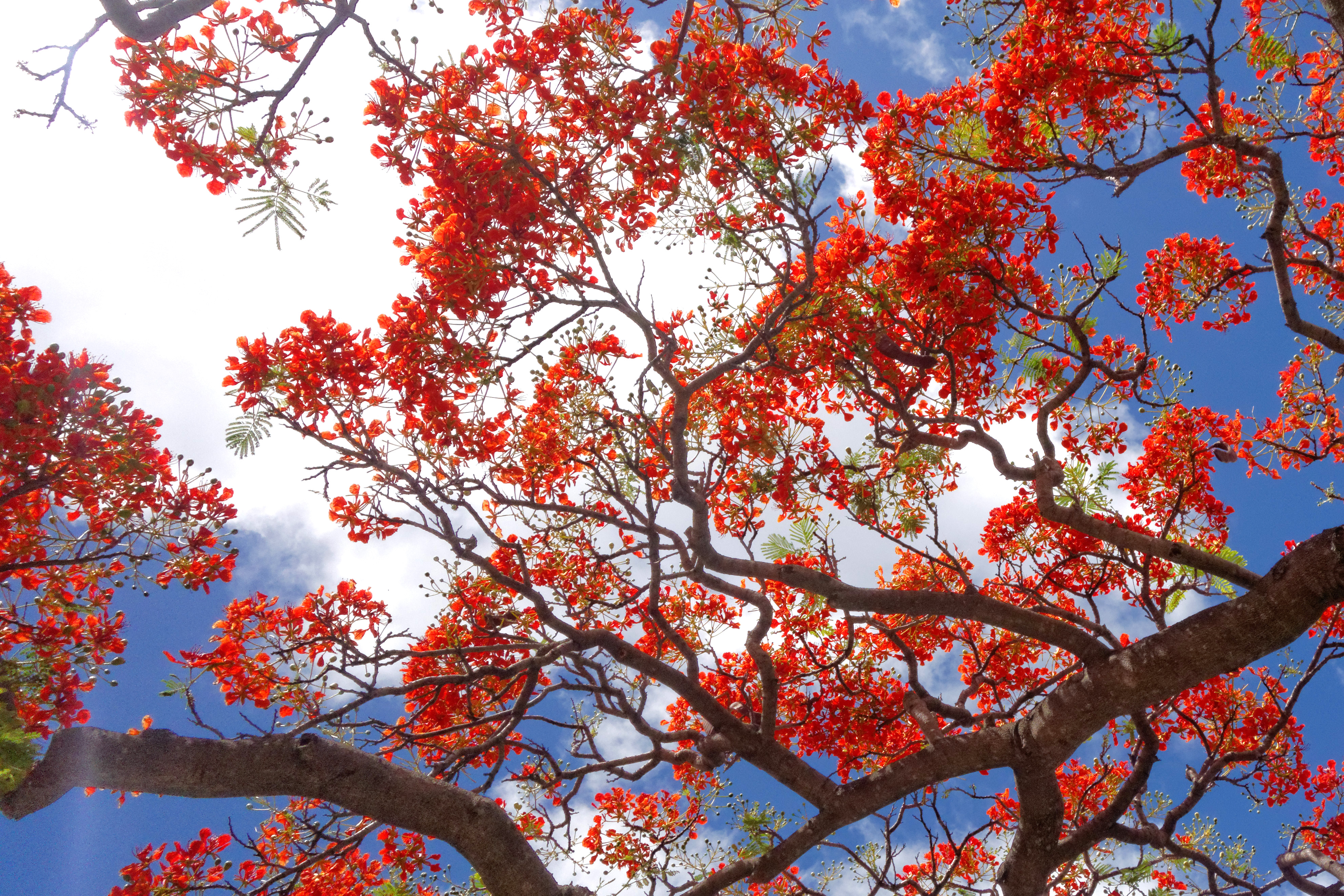 Royal Poinciana Close up